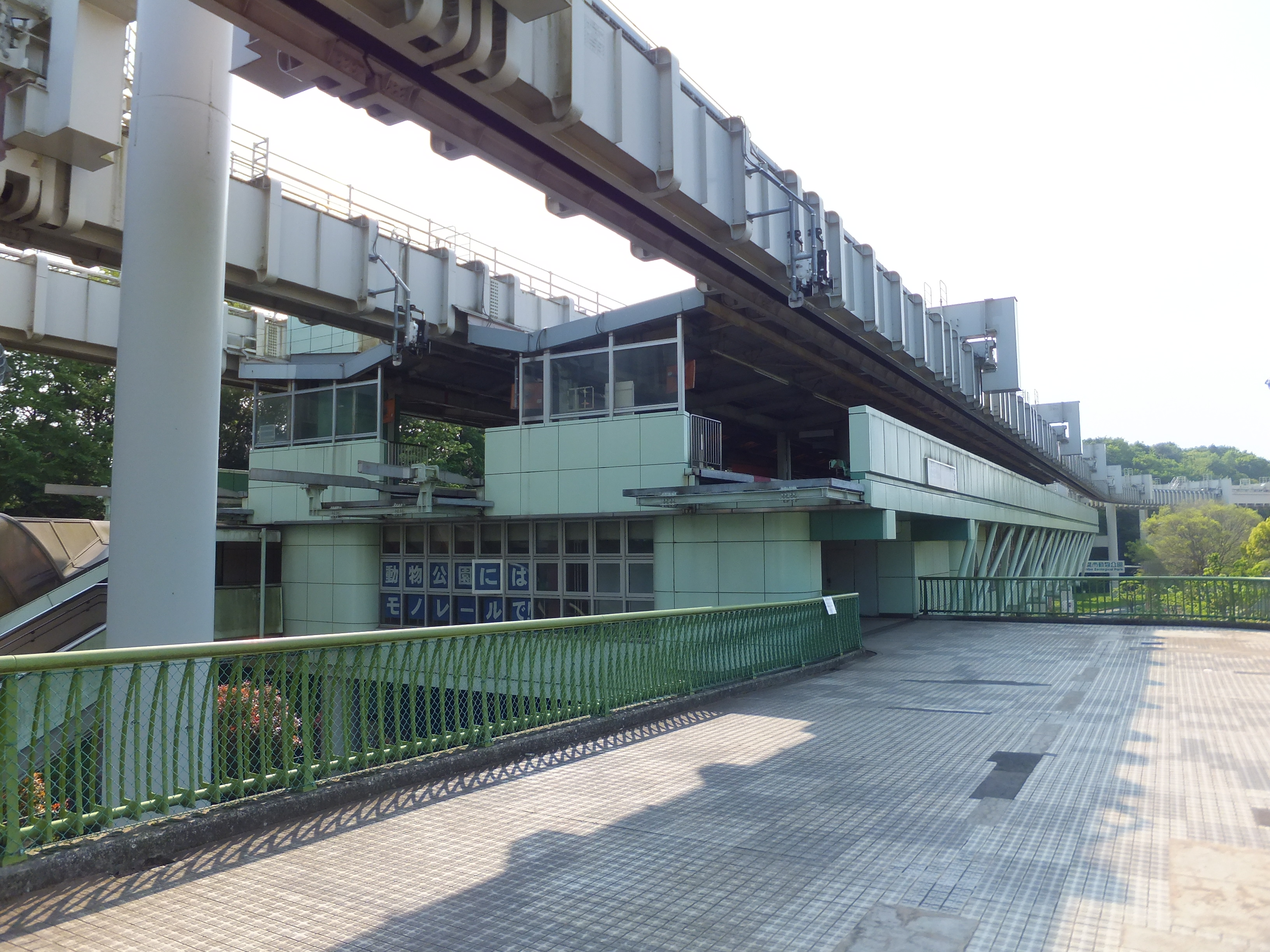 千葉都市モノレール動物公園駅